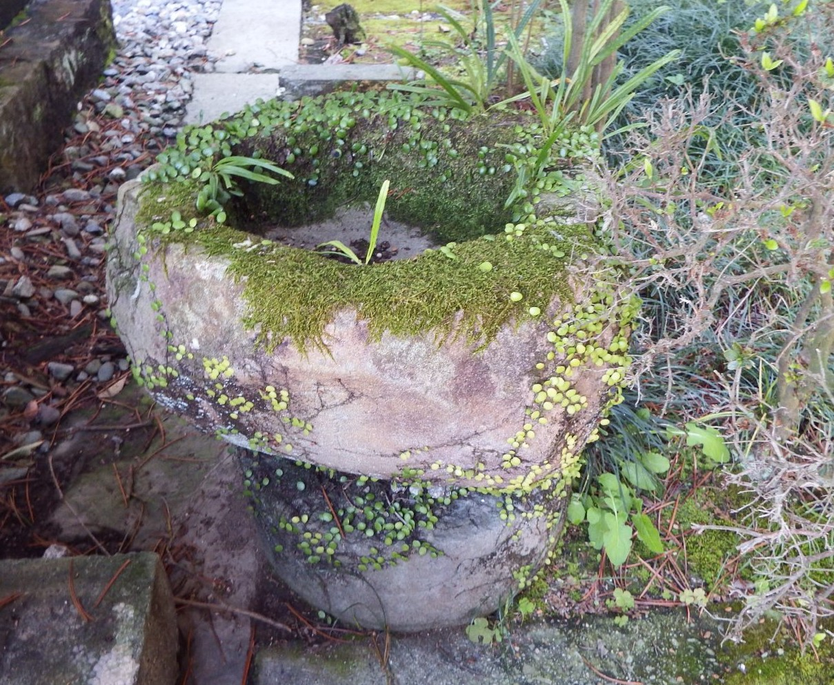 種間寺の石造手水鉢